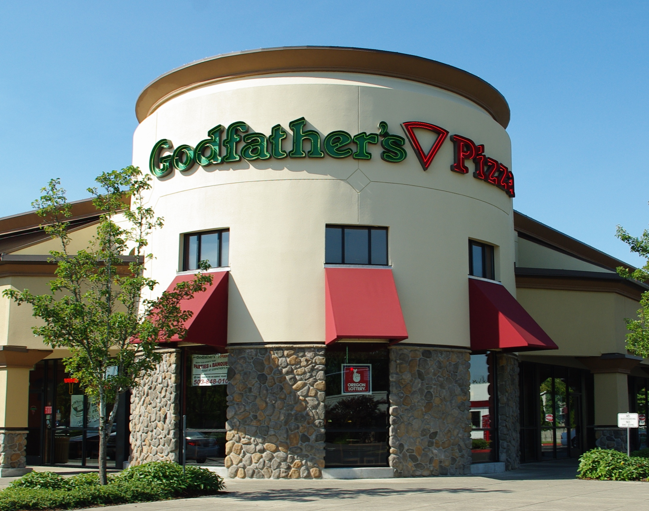 Godfathers Pizza in Hillsboro, Oregon.